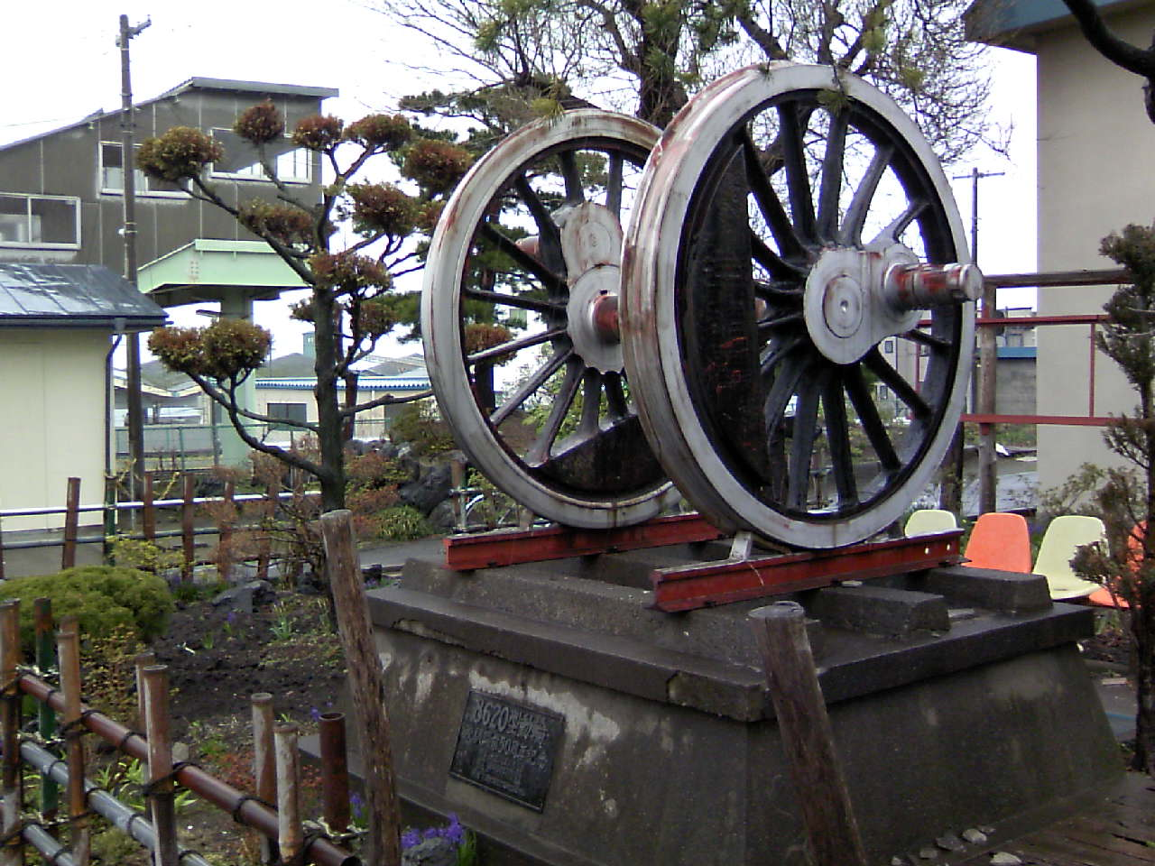 JR八戸線・鮫駅 鮫駅開業50周年記念「8620型動輪」- 昭和49年11月10日建立 (JR SAME STA. - AOMORI, JAPAN)